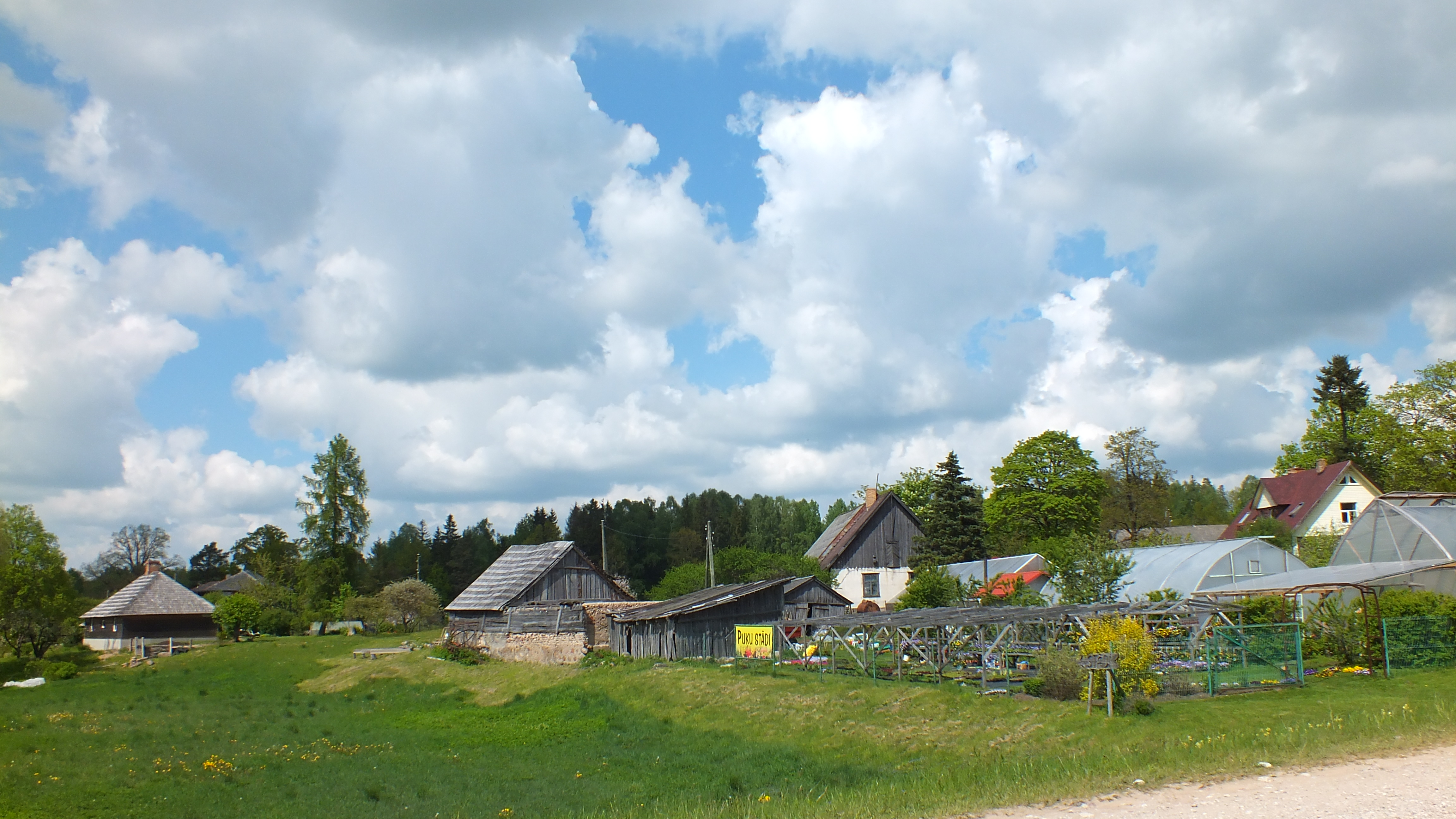 Stādaudzētava Andumos